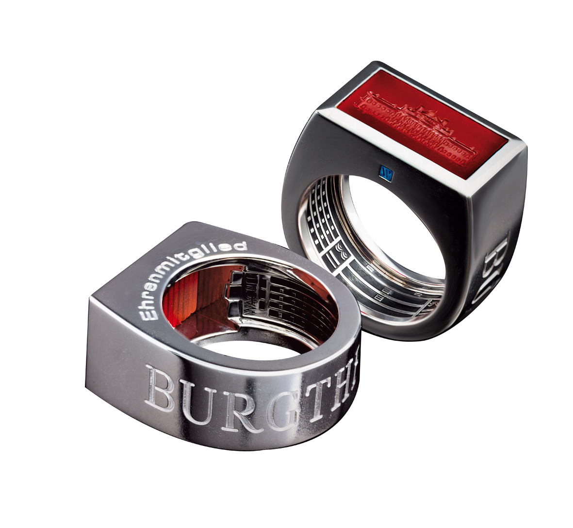 Ehrenring des Wiener Burgtheaters